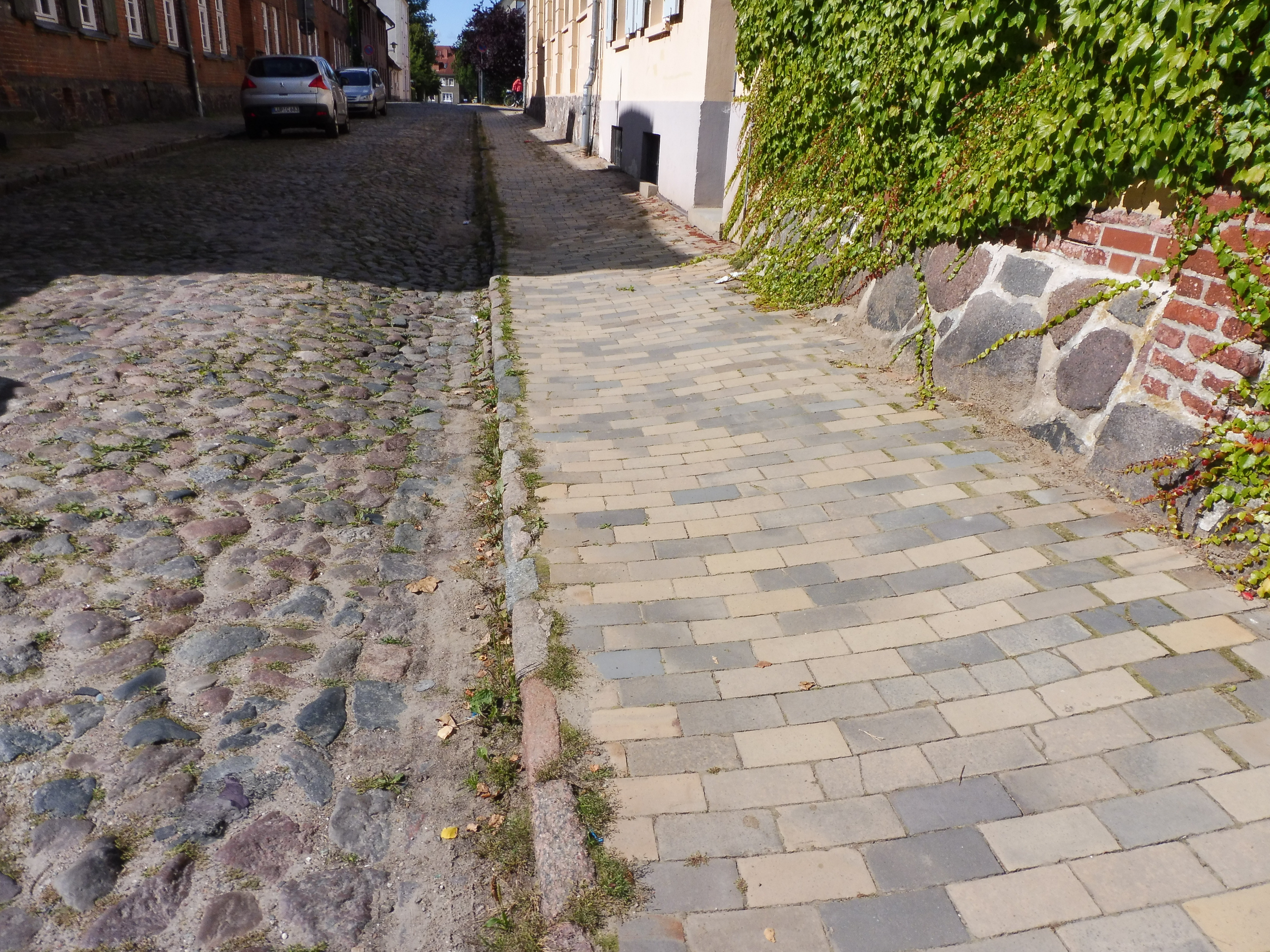 Straße mit altem Kopfsteinpflaster und geziegeltem Bürgersteig in Güstrows Krückmannstraße